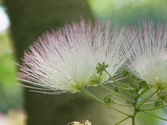 Species: Albizia julibrissin Family: Mimosaceae Image No. 2